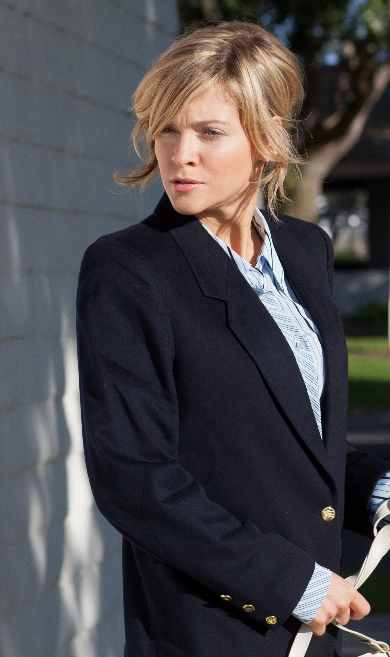 Dana Agisheva, Los Angeles